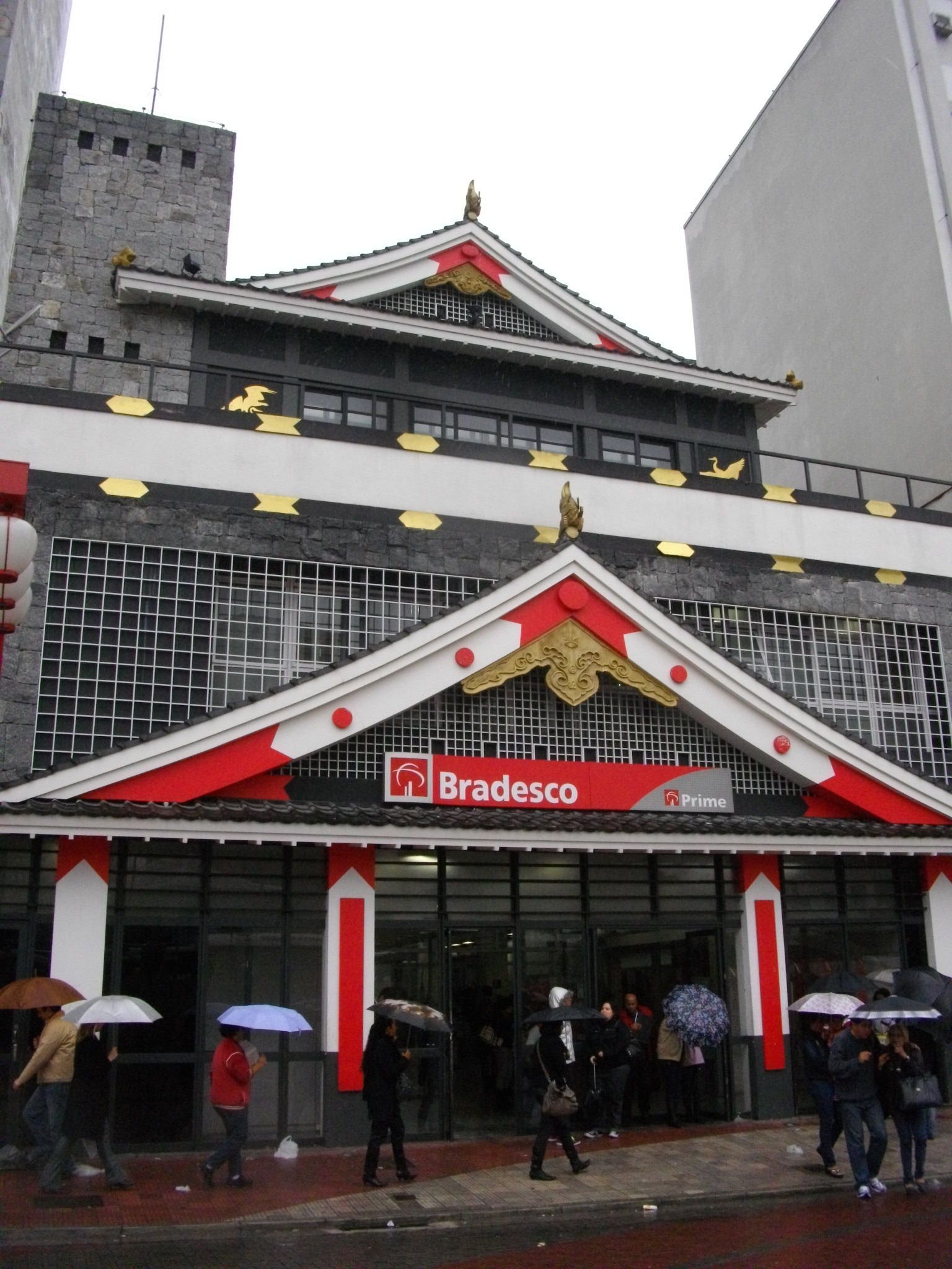 サンパウロ、Liberdade（リベルダーデ）の東洋人街の銀行。 外観を日本のお城風にしてあって、こういう配慮は嬉しい。